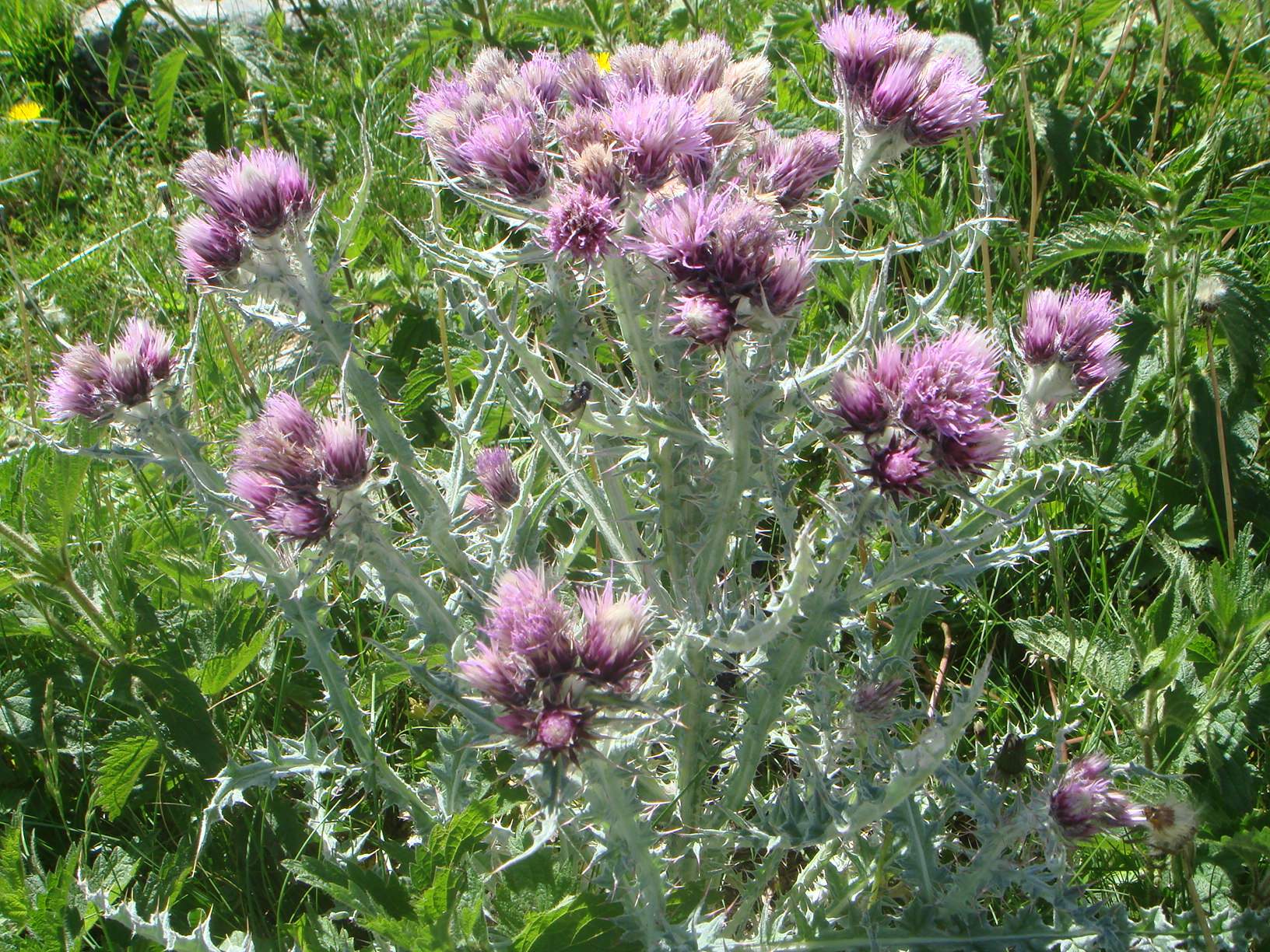 Carduus carlinoides Lago Cap de Long. Reserva de Néouvielle, (Altos Pirineos), Francia